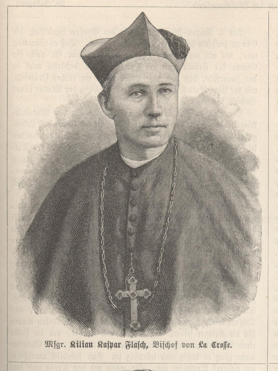 engraving